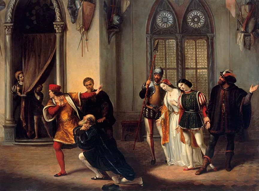 La condanna di Ugo e Parisina, olio su tela, 118 x 159 cm., Museo dell'Ottocento, Ferrara